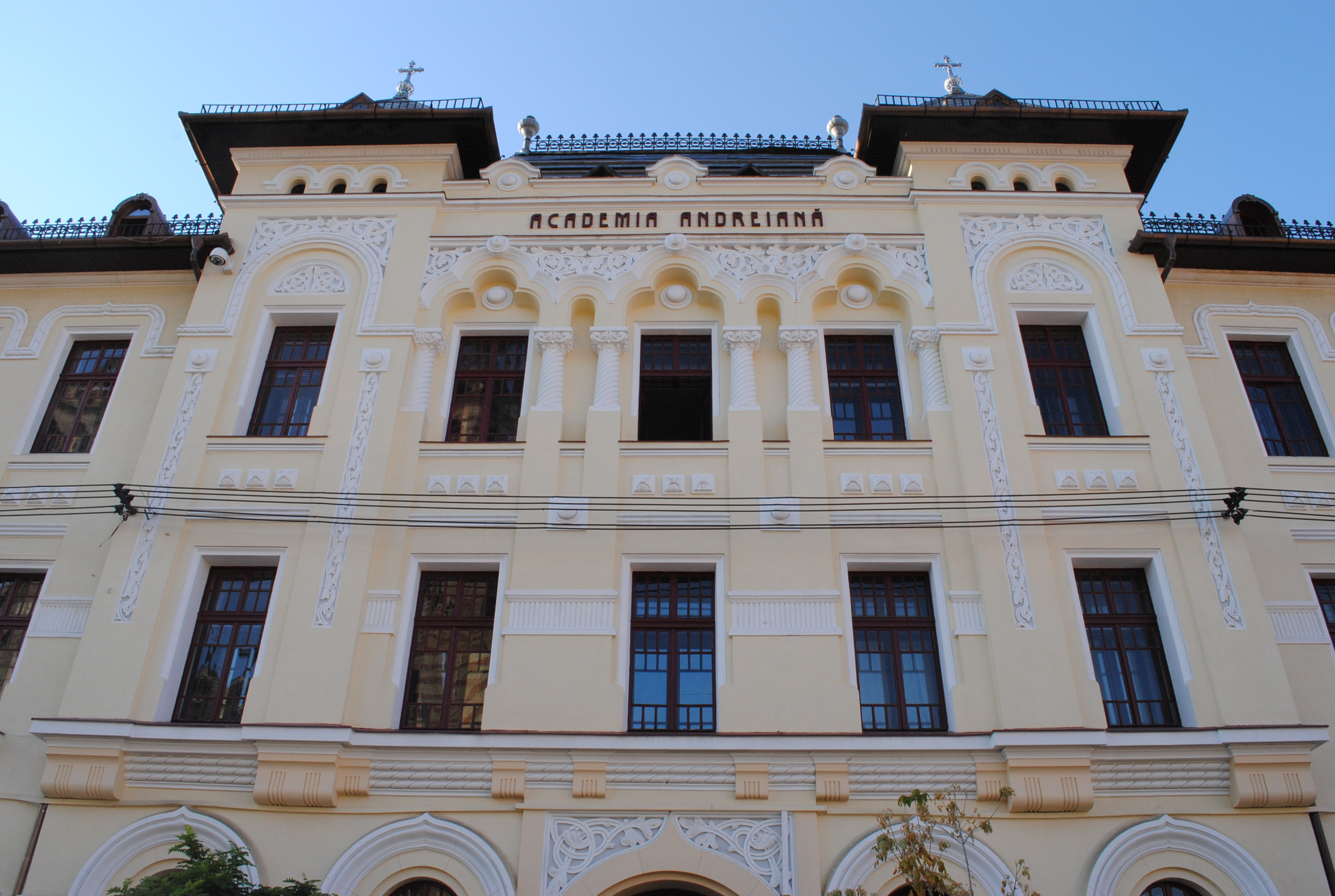 Ansamblul "Mitropolia Ortodoxă și Facultatea de Teologie Ortodoxă" sf. sec. XVIII-prima treime a sec. XX